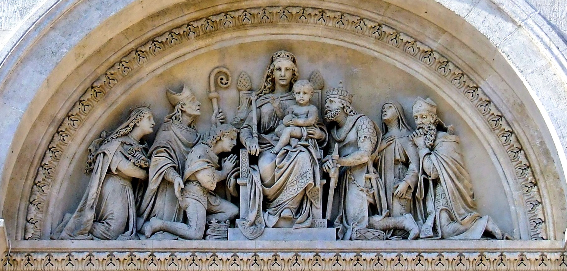 Magyar szentek hódolata a Magyarok Nagyasszonya előtt. Dombormű a pécsi székesegyház bejárata felett. Kiss György szobrászművész alkotása (1891) This is a photo of a monument in Hungary. Identifier: 1796